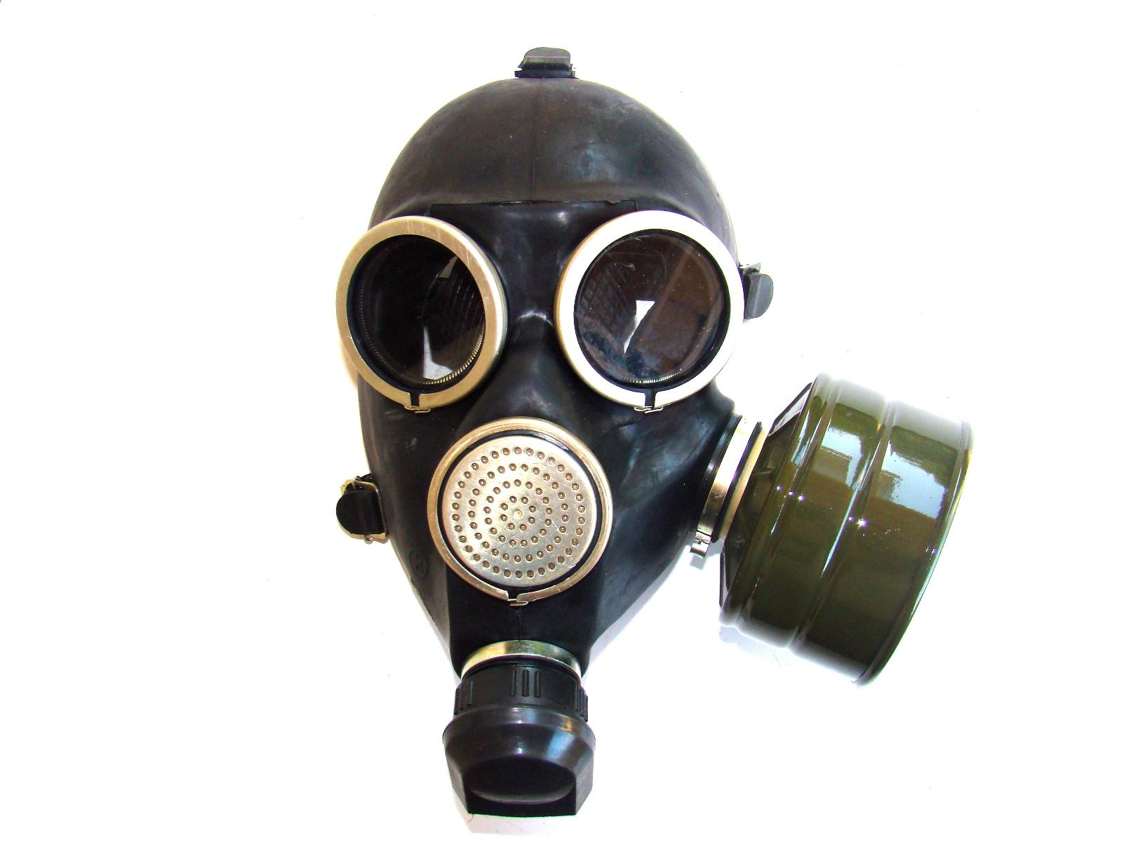 Гражданский противогаз ГП-7